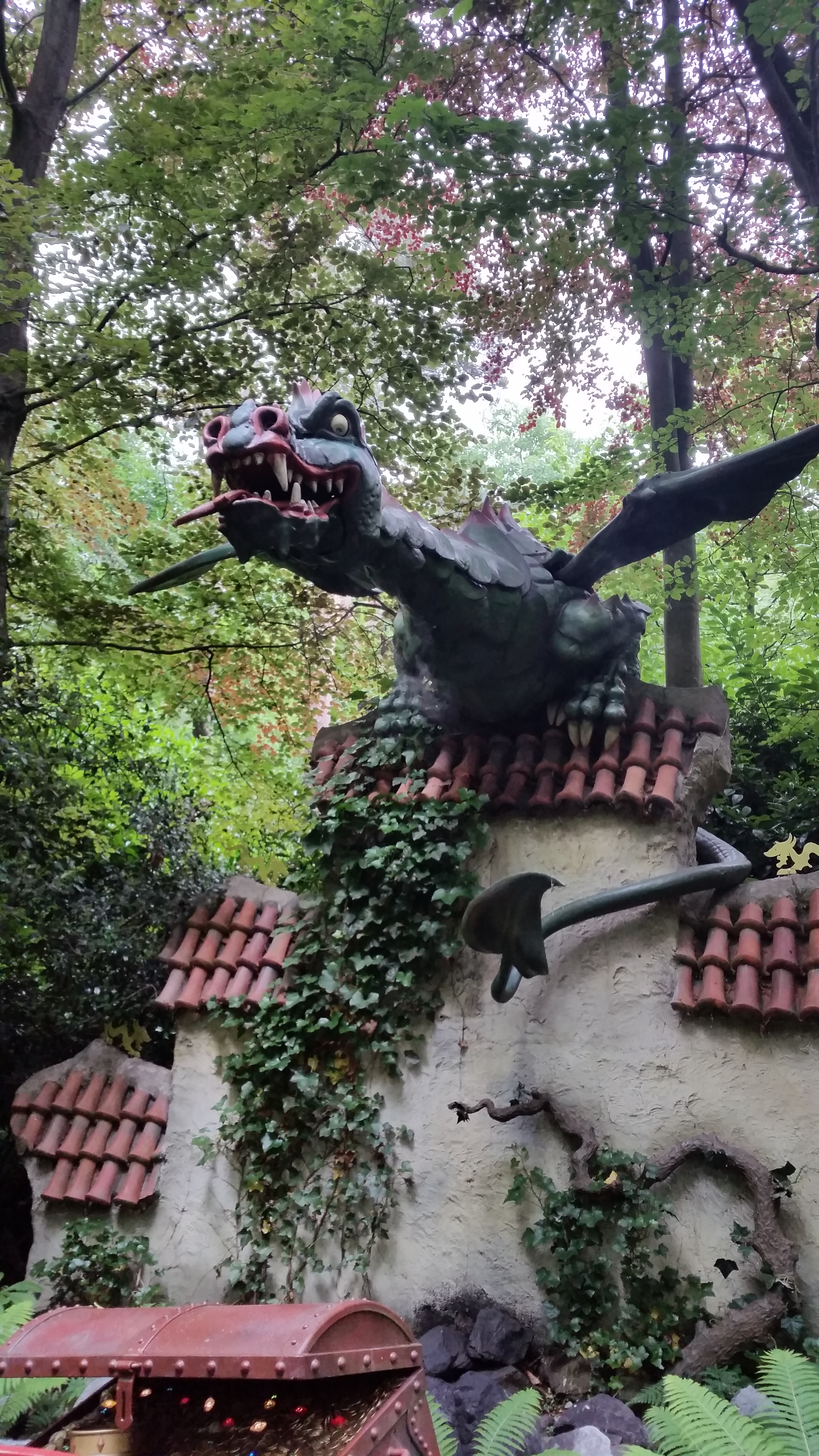 De draak uit het Sprookjesbos in de Efteling